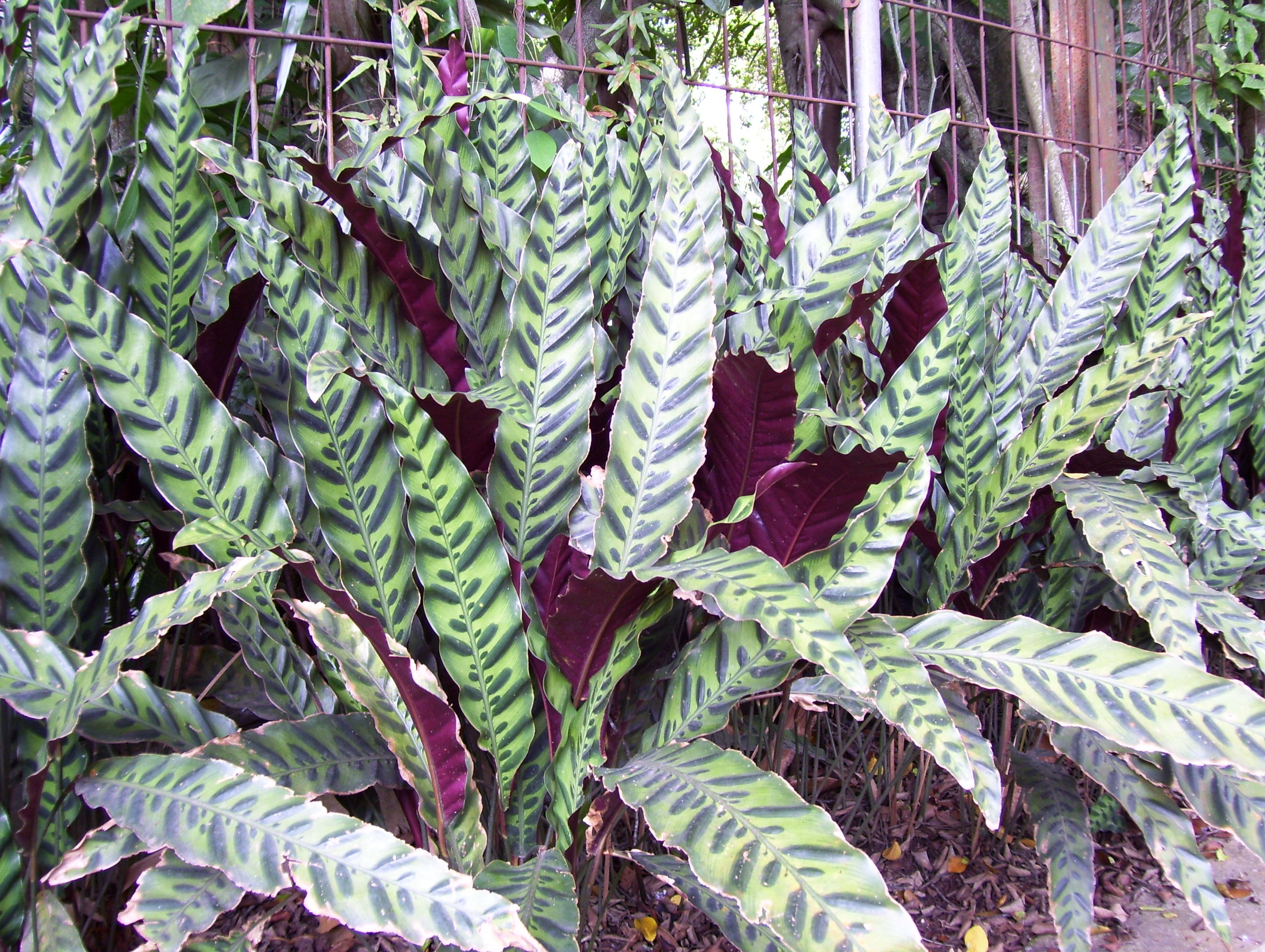 Taken from Ragunan Zoo, Jakarta, Indonesia